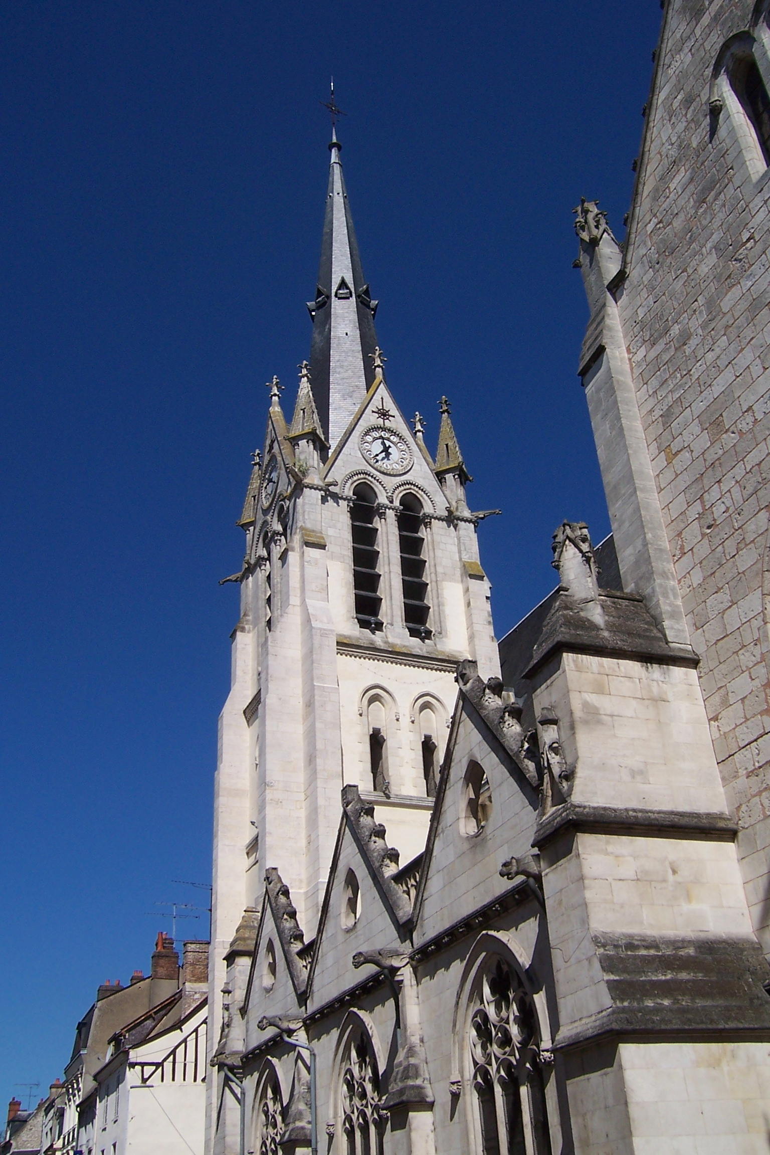 France - Loiret - Montargis - L'église